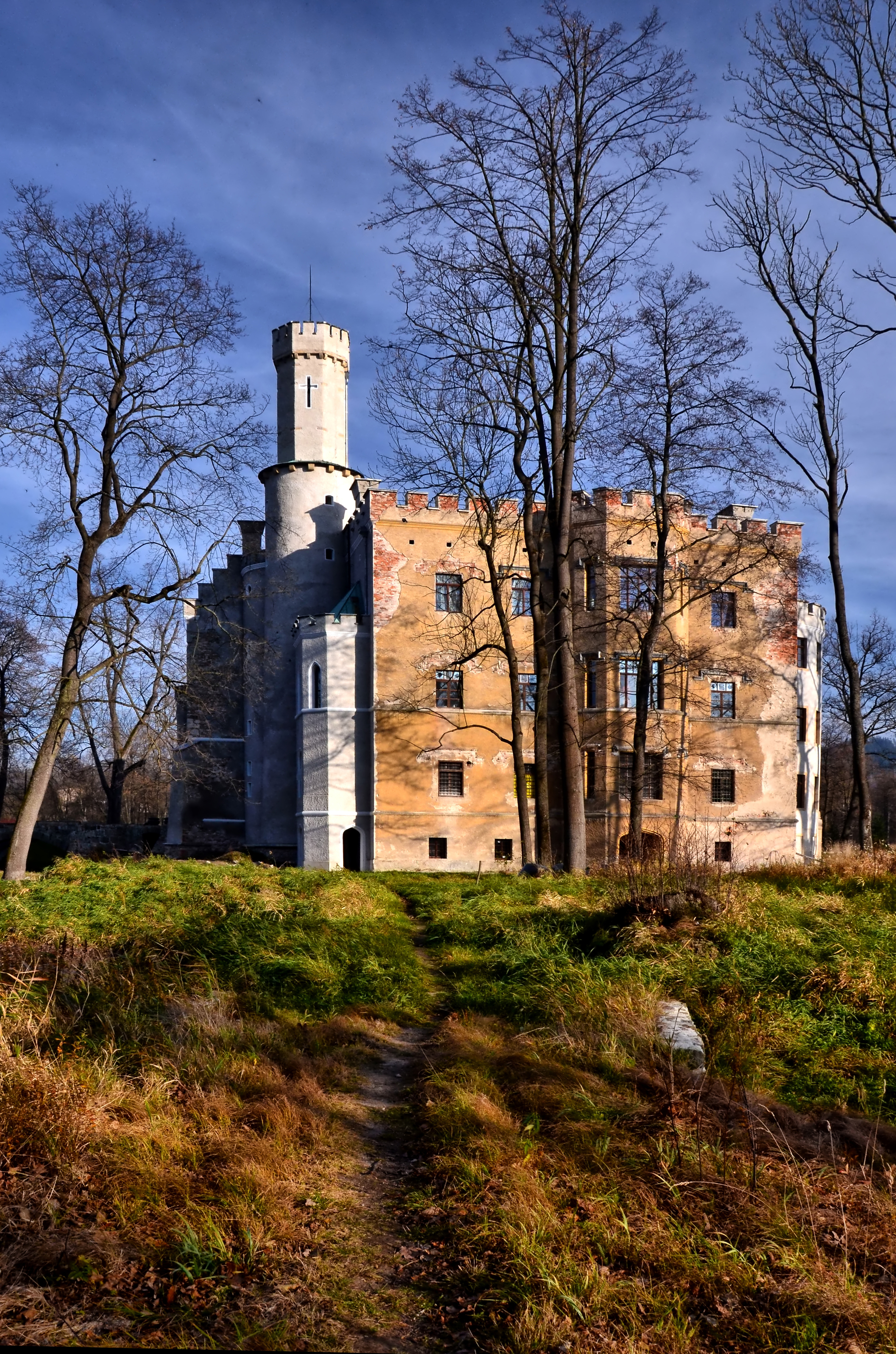 Pałac w Karpnikach przy ul. Łąkowej 1. Gmina Mysłakowice, powiat jeleniogórski.